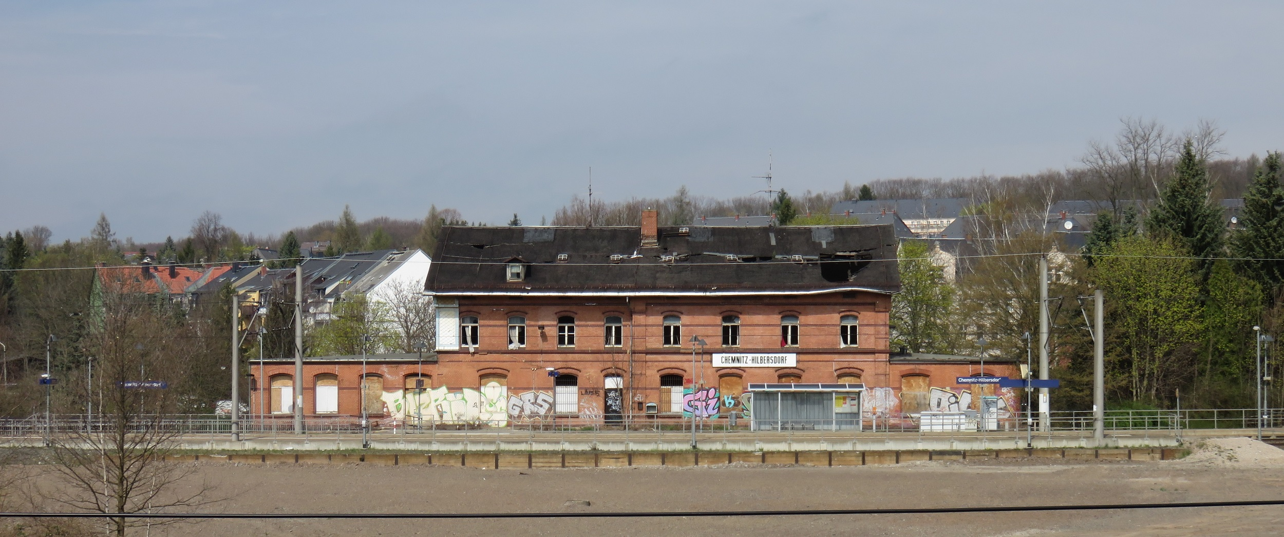 Bahnhof Chemnitz Hilbersdorf. Bestehend im Stadtteil Ebersdorf. Sanierungsbedürftiges Bahnhofsgebäude. Stand des Bildes: Mai 2015. Kulturdenkmal Chemnitz Ebersdorf.